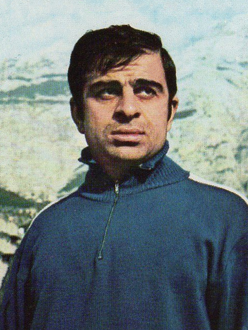 FIGURINA PANINI CAMPIONI DELLO SPORT ANNO 1973/74 N. 121 CALCIO KHOURTZILAV